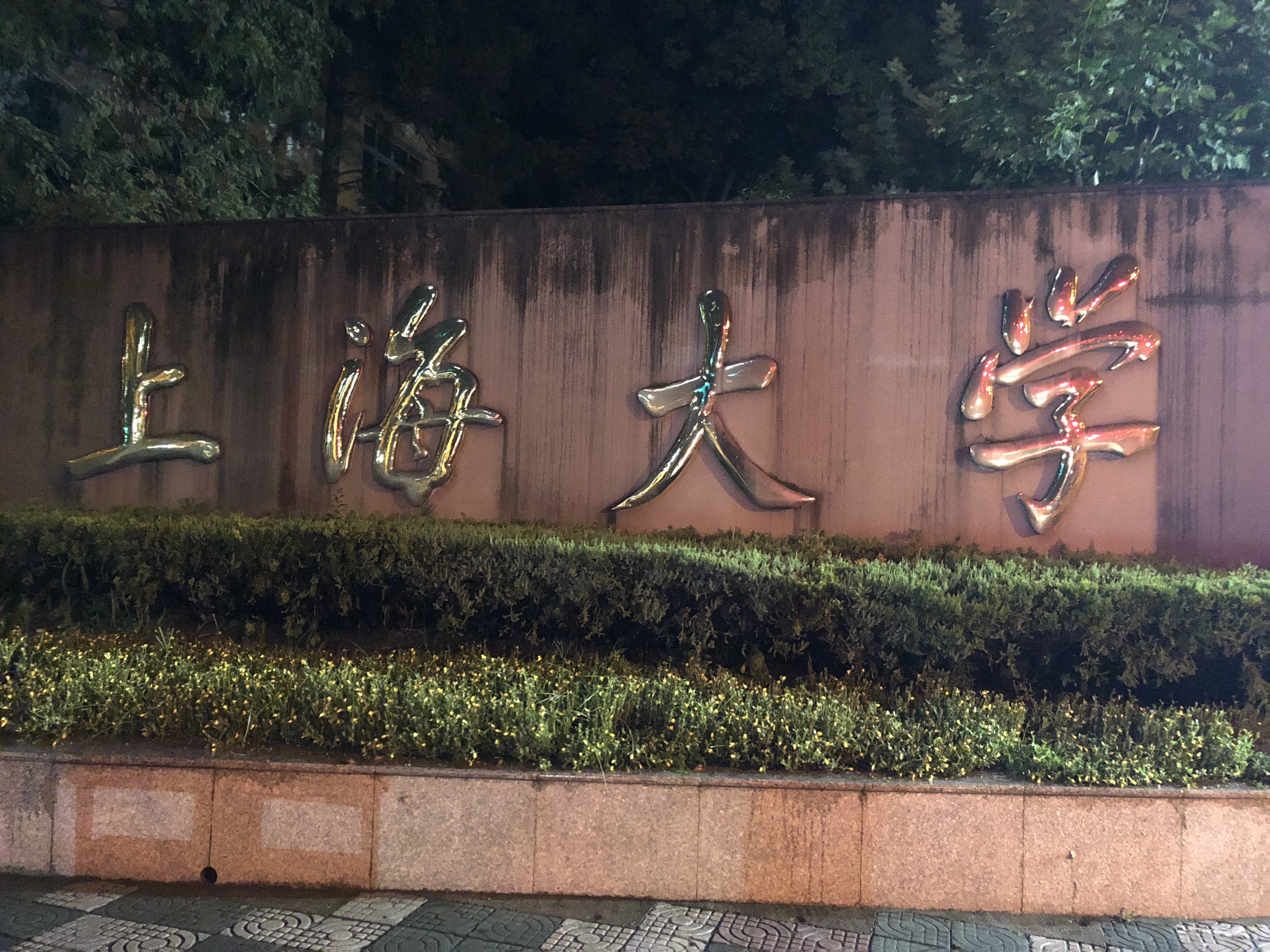 中文（中国大陆）: 上海大学嘉定校区校牌